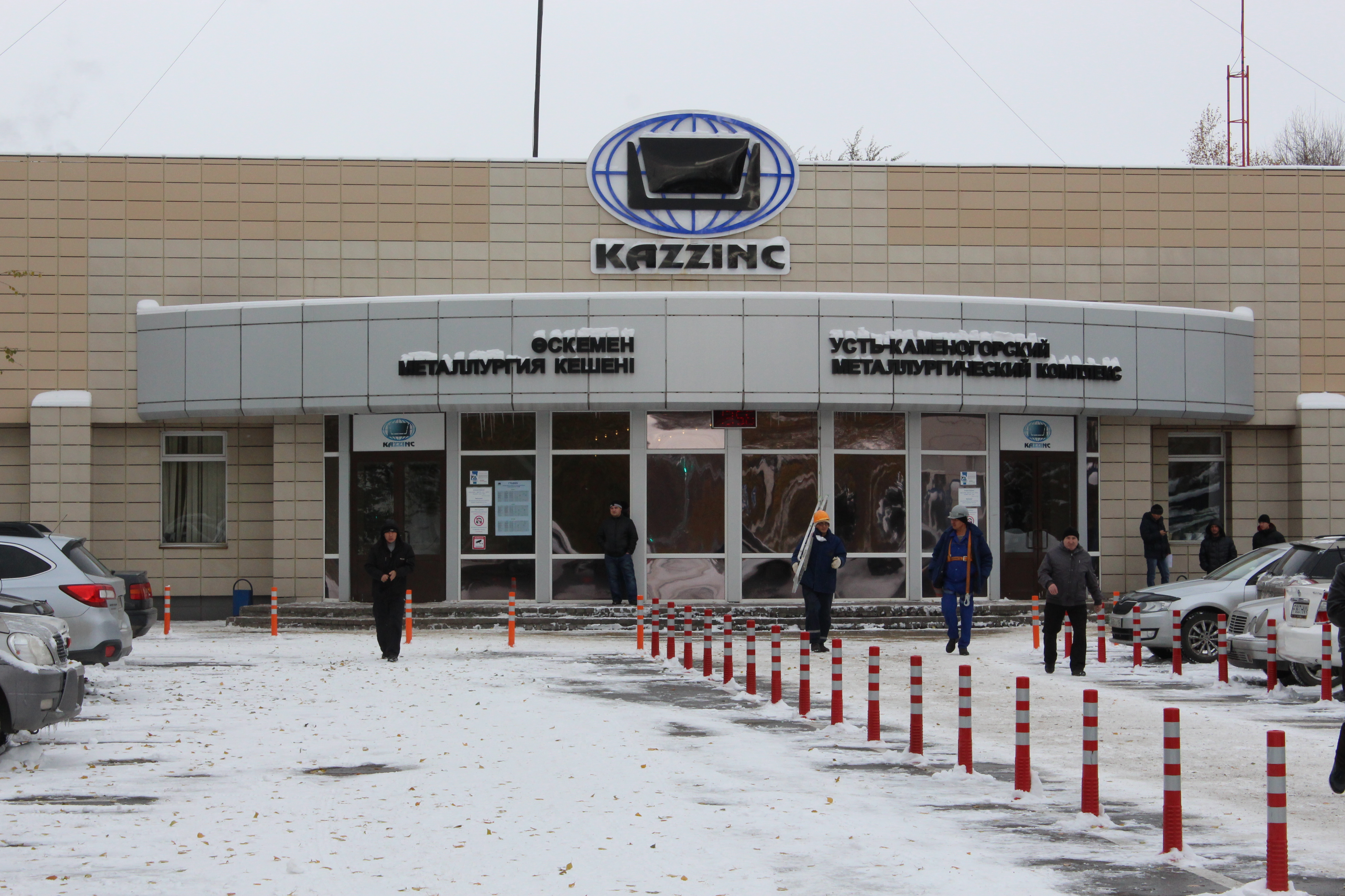 Қазақша (кирил): Өскемен металлургия кешені